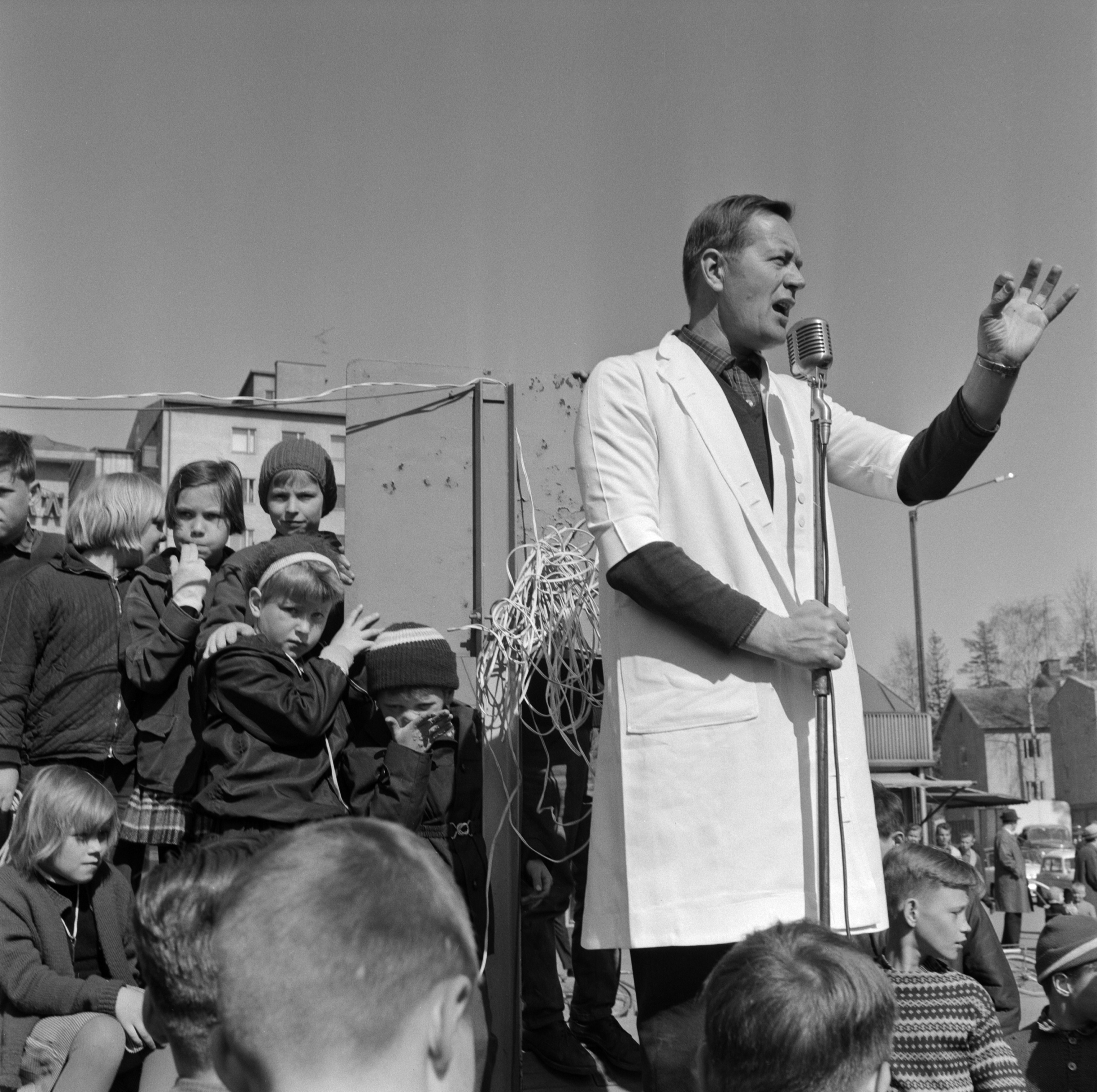 Ihmisiä Herttoniemen torilla pääsiäisenä. Niilo Tarvajärvi pitää puhetta.